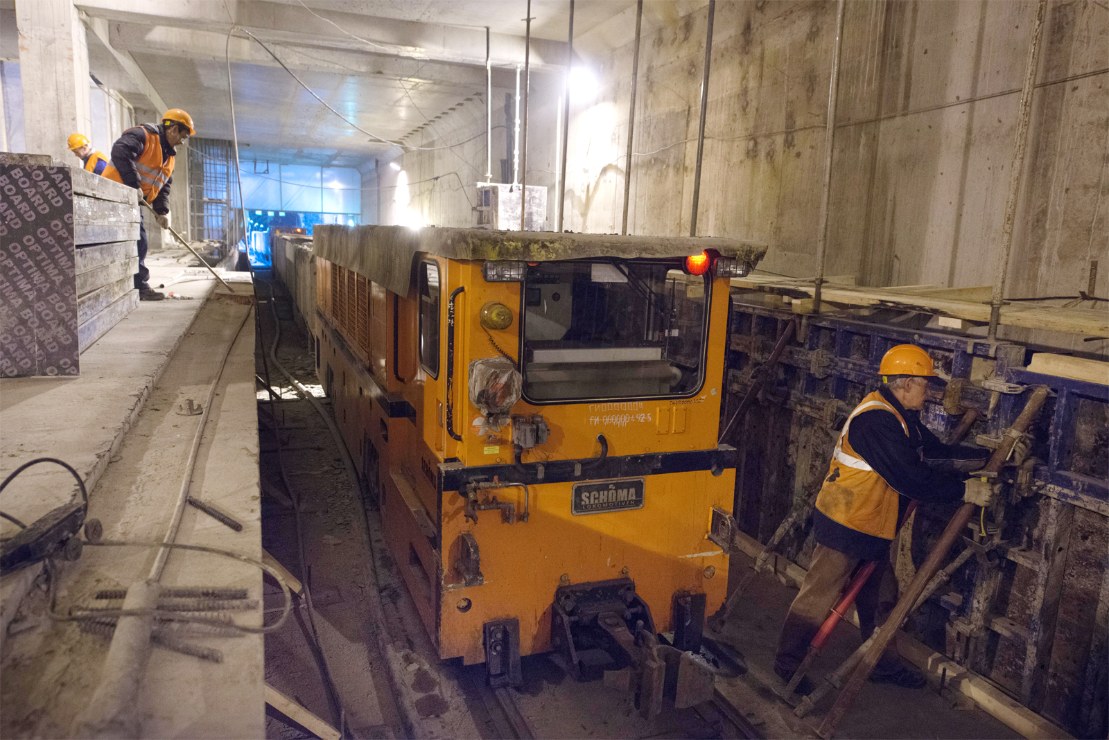 Строящаяся станция «Петровский парк» Московского метро. Узкоколейный локомотив с поездом на путях станции